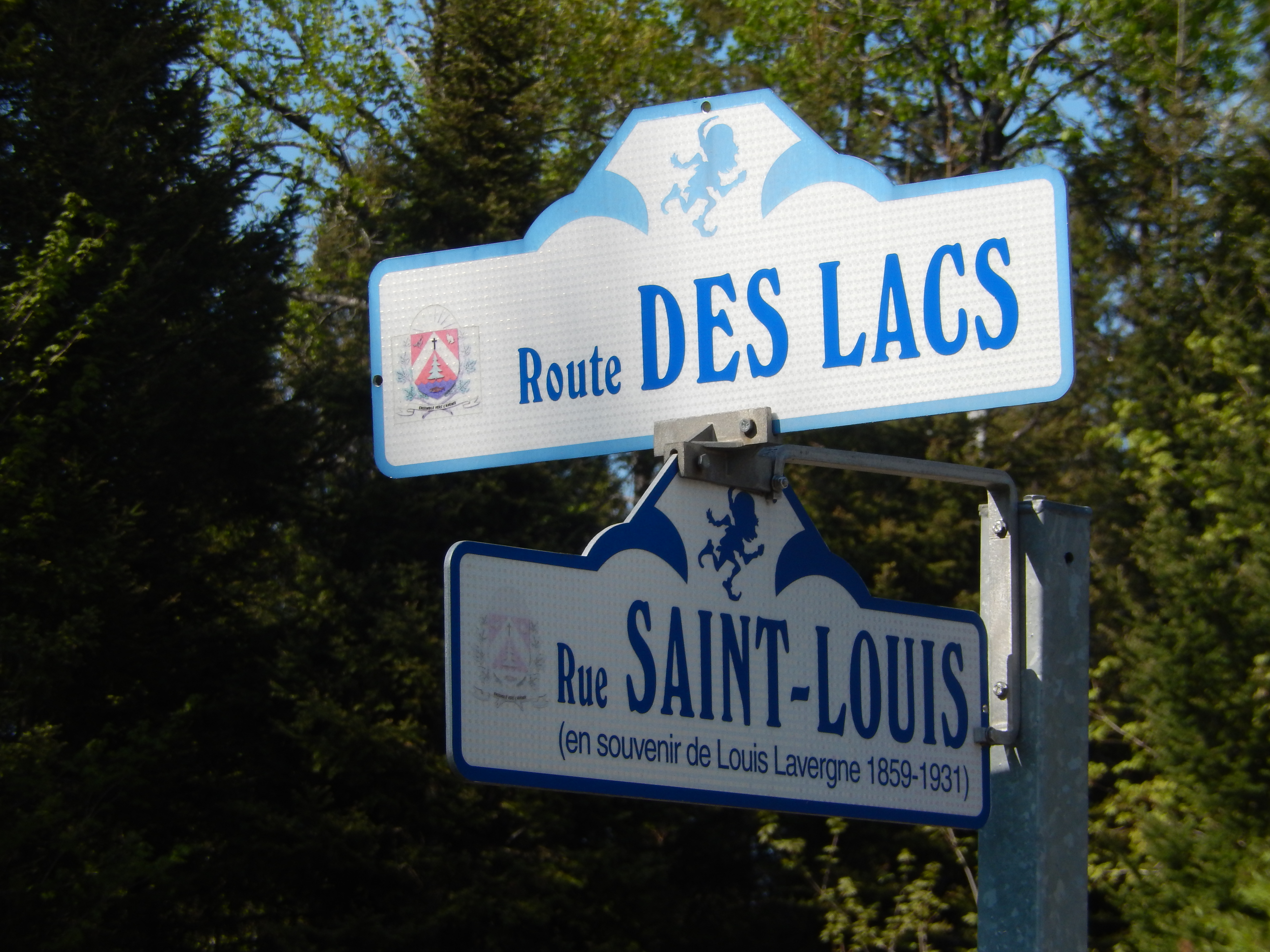 Panneau de rue Saint-Élie-de-Caxton